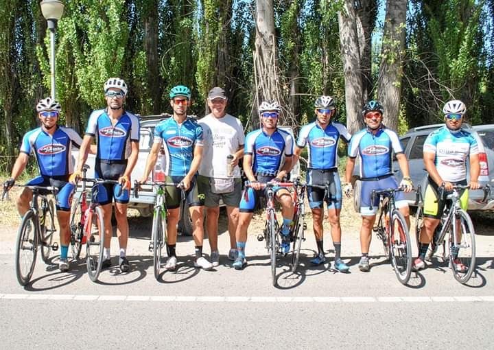 equipo de ciclismo de la Patagonia